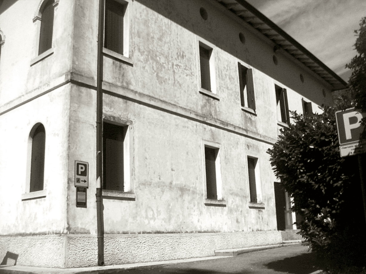 Colle Umberto (Treviso, Italia): lato destro dell'edificio municipale, già monastero benedettino.